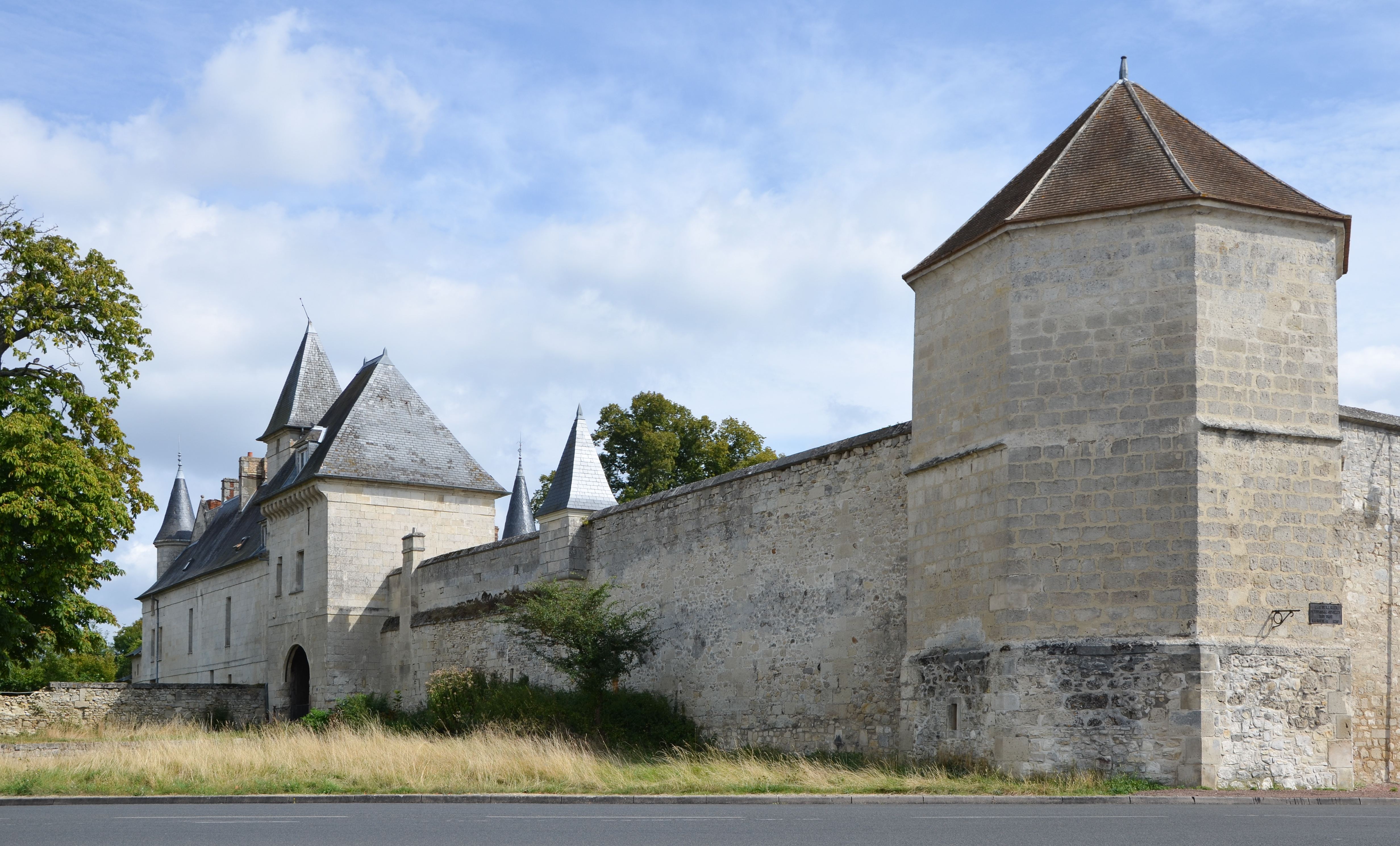 Manoir de Coyolles , Aisne, Picardie, France